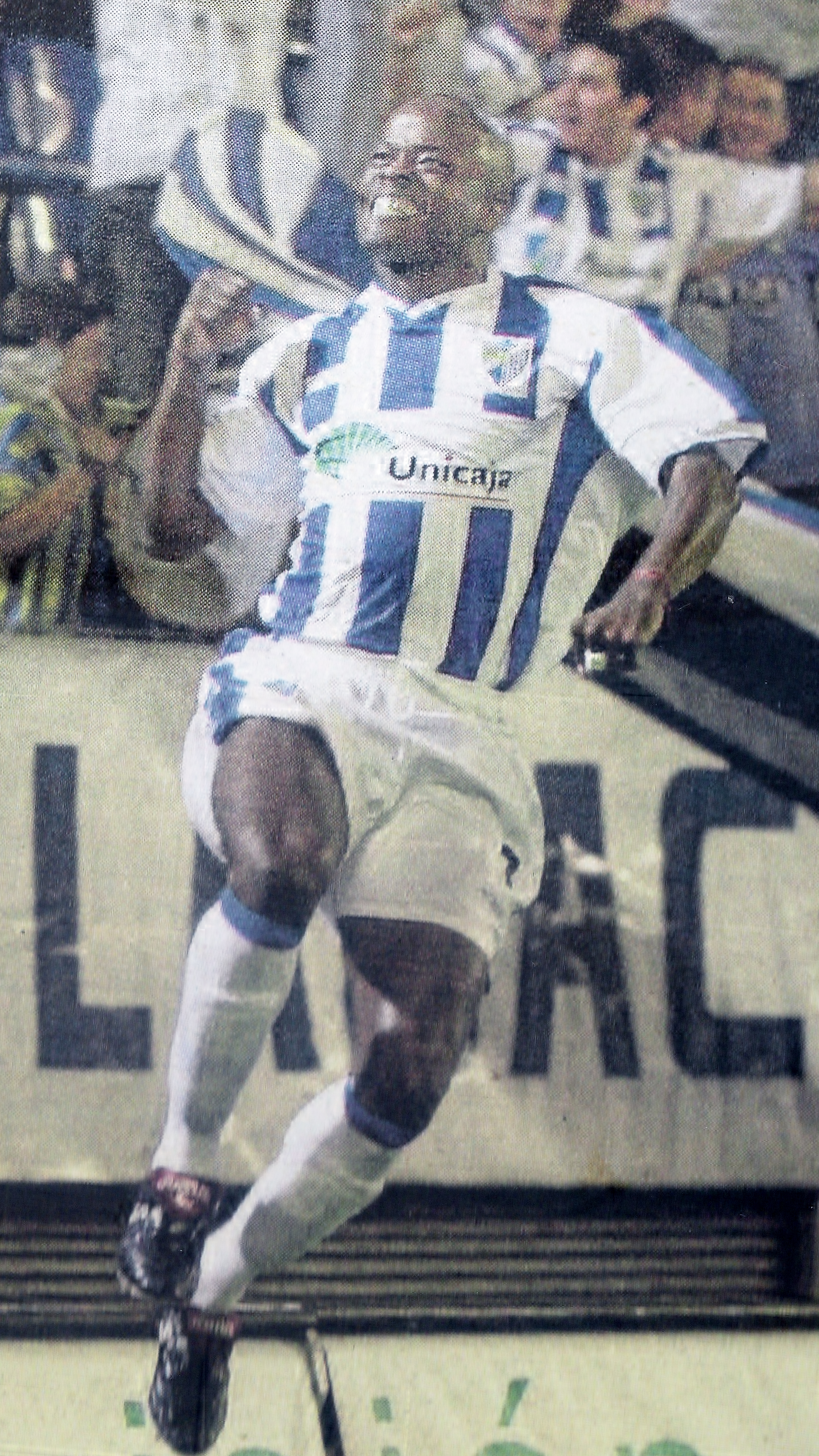 Julio César Dely Valdes jugando para el Málaga CF.